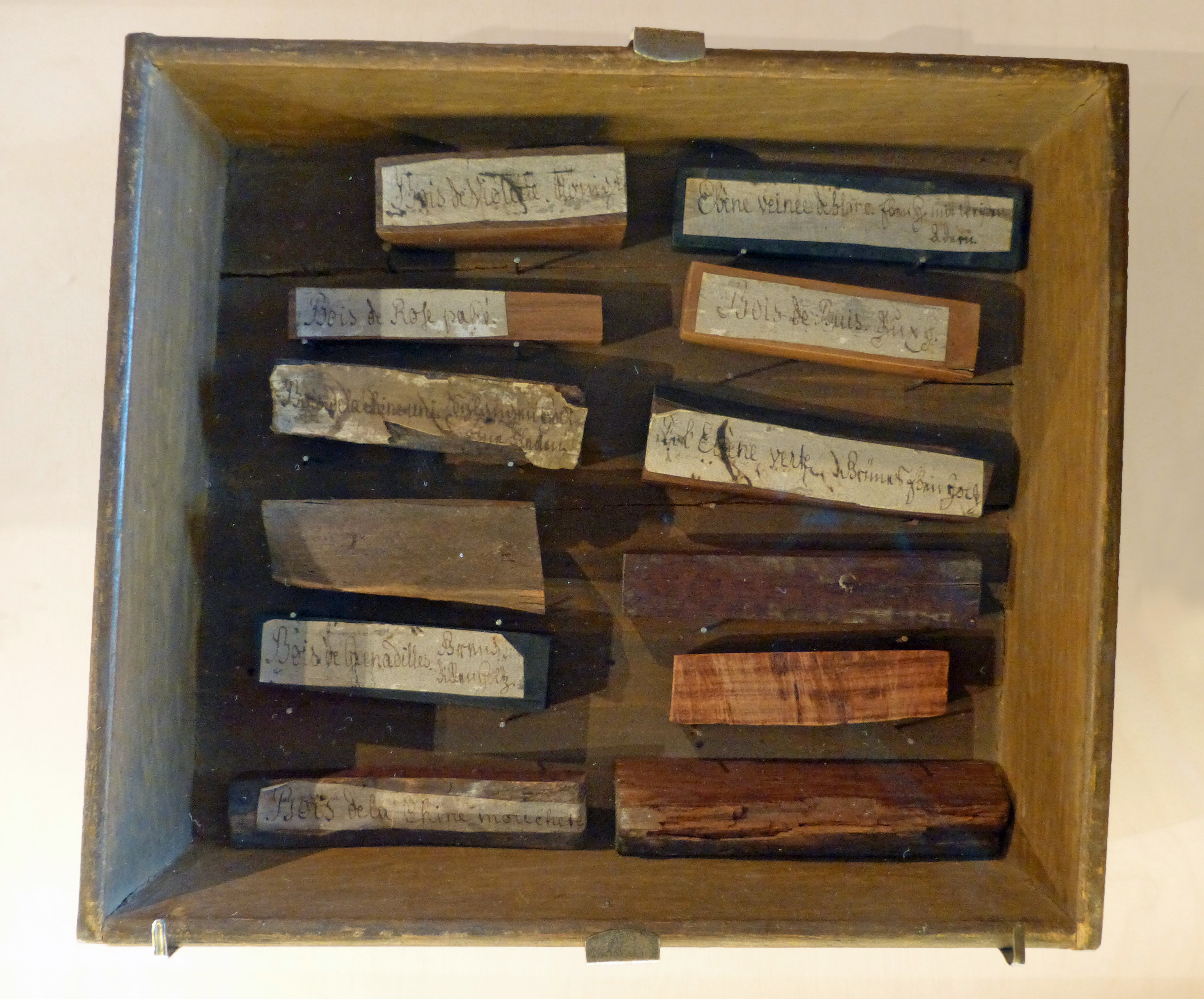 Echantillons de bois régionaux du XVIIIe siècle, réunis par le pasteur Jean-Frédéric Oberlin. Les noms français et allemands sont mentionnés pour chaque plaquette. Musée Jean-Frédéric Oberlin à Waldersbach (Bas-Rhin, Alsace). Dépôt du Musée alsacien de Strasbourg.